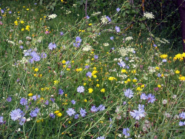 Description:Природне лепоте Златибора author: Snezana Trifunovic Source: self-made